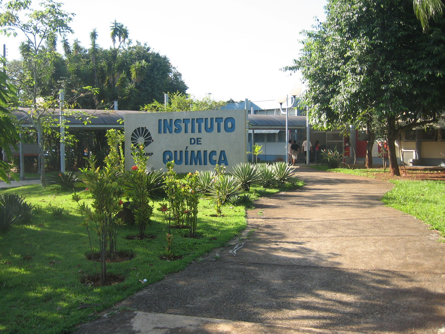 Instituto de Química da Unicamp.